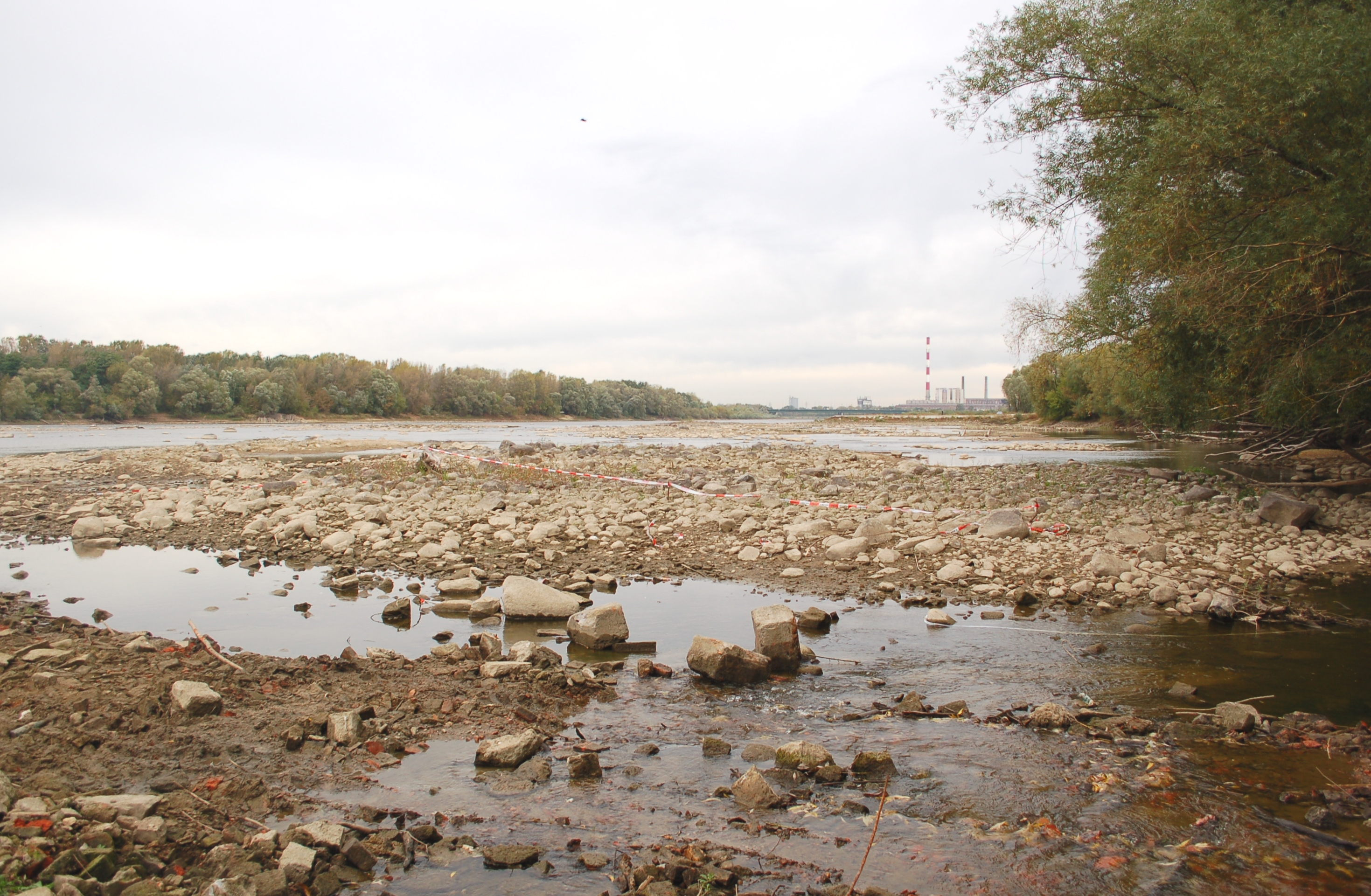 Niedrigwasser Weichsel Warschau September 2012, Fund-/Ausgrabungsstätte